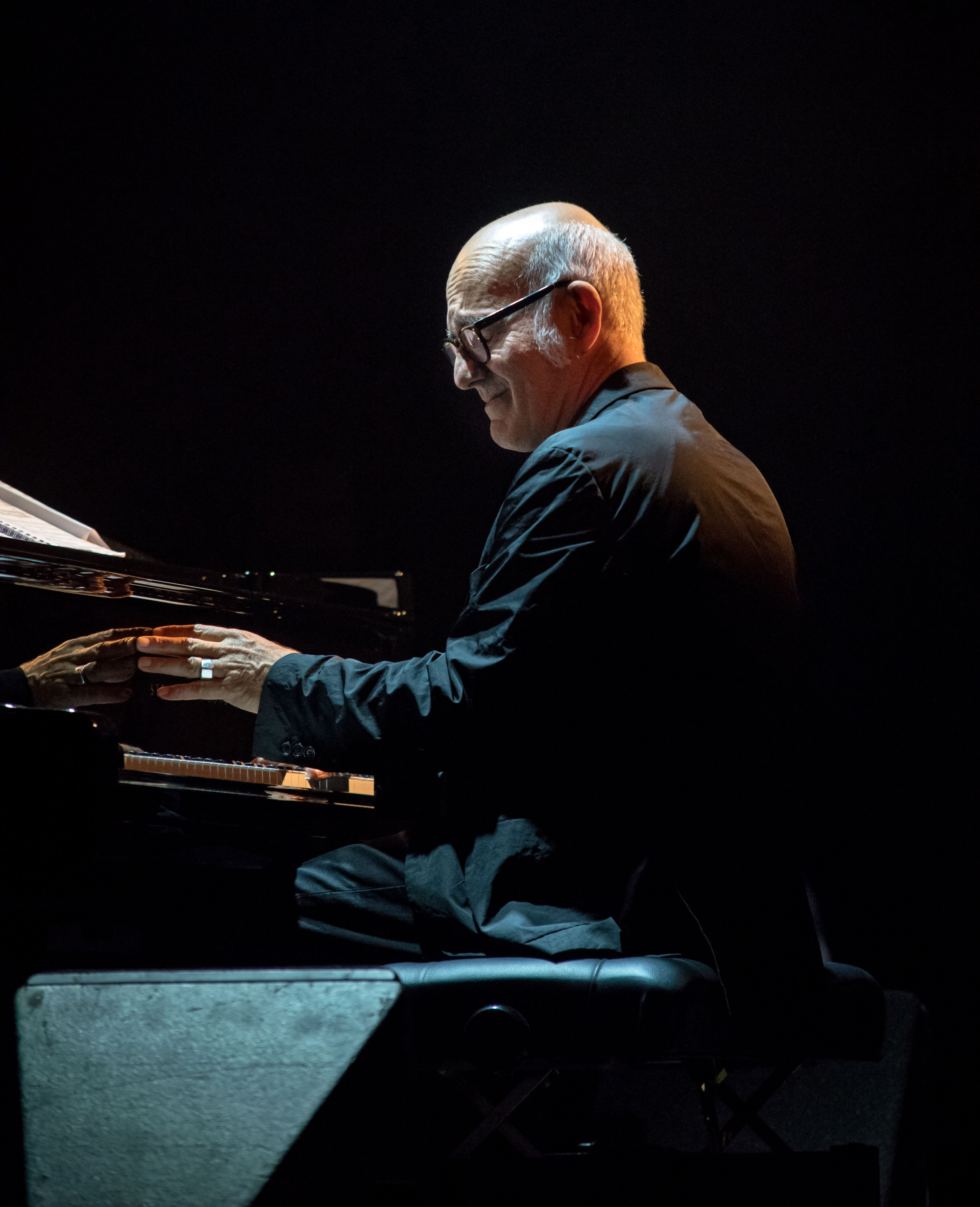 Bilder vom Zelt Musik Festival 2016 in Freiburg im Breisgau Ludovico Einaudi und Ensemble